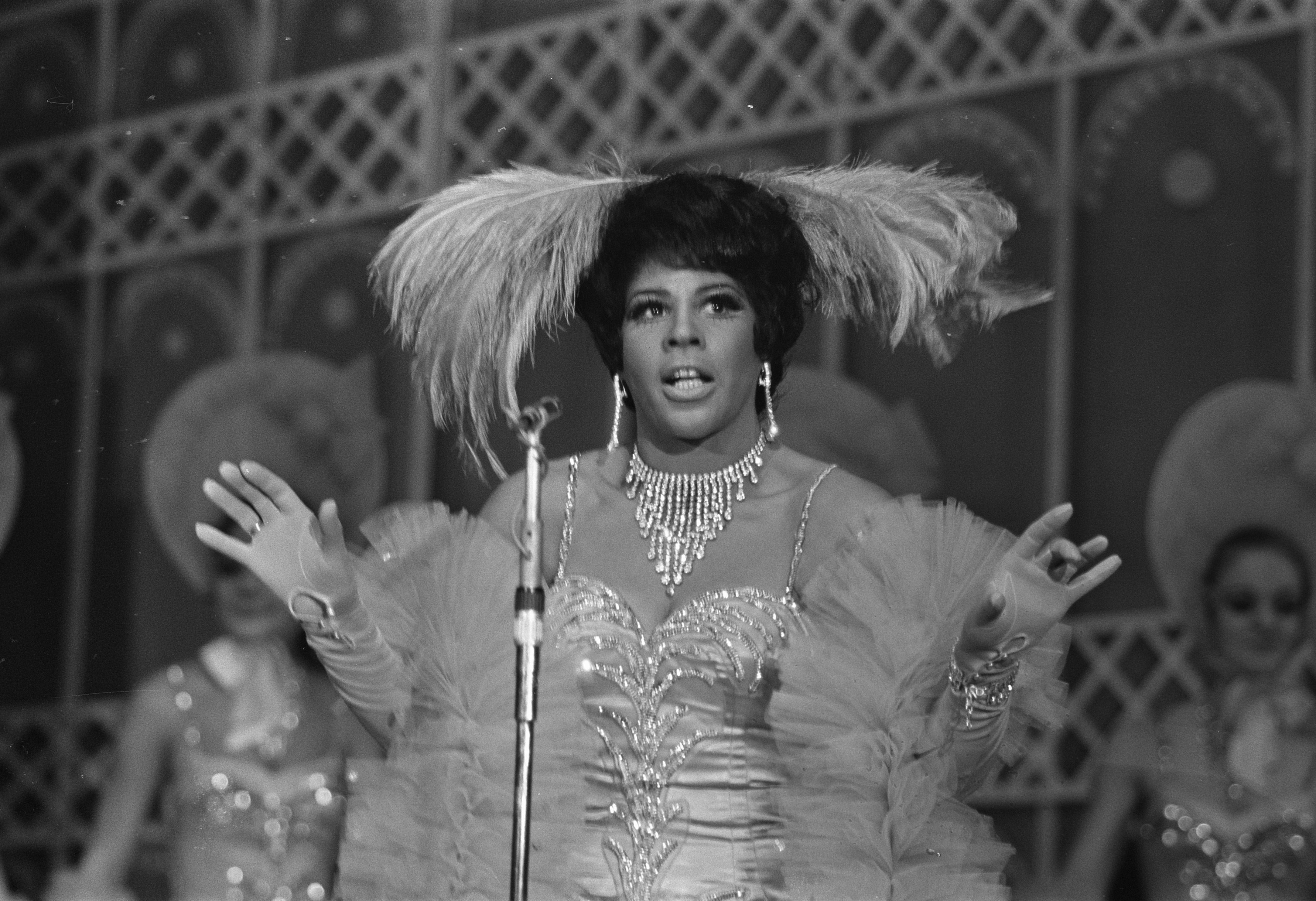 Collectie / Archief : Fotocollectie Anefo Reportage / Serie : [ onbekend ] Beschrijving : Generale repetitie Snip en Snap Revue 1970 in Amsterdam Milly Scott Datum : 16 december 1969 Locatie : Amsterdam, Noord-Holland Trefwoorden : repetities Persoonsnaam : Scott, Milly Instellingsnaam : Snip en Snap Fotograaf : Koch, Eric / Anefo Auteursrechthebbende : Nationaal Archief Materiaalsoort : Negatief (zwart/wit) Nummer archiefinventaris : bekijk toegang 2.24.01.05 Bestanddeelnummer : 923-0855